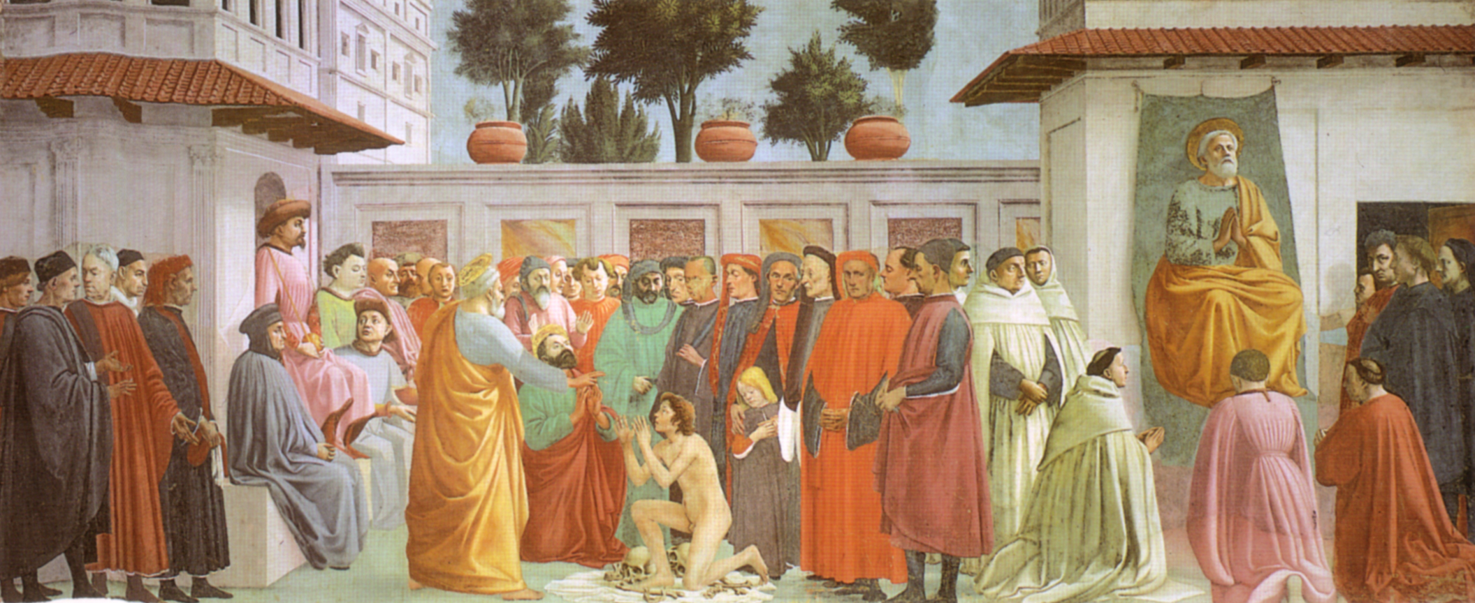 Cappella brancacci, Resurrezione del figlio di Teofilo e San Pietro in cattedra (restaurato), Masaccio